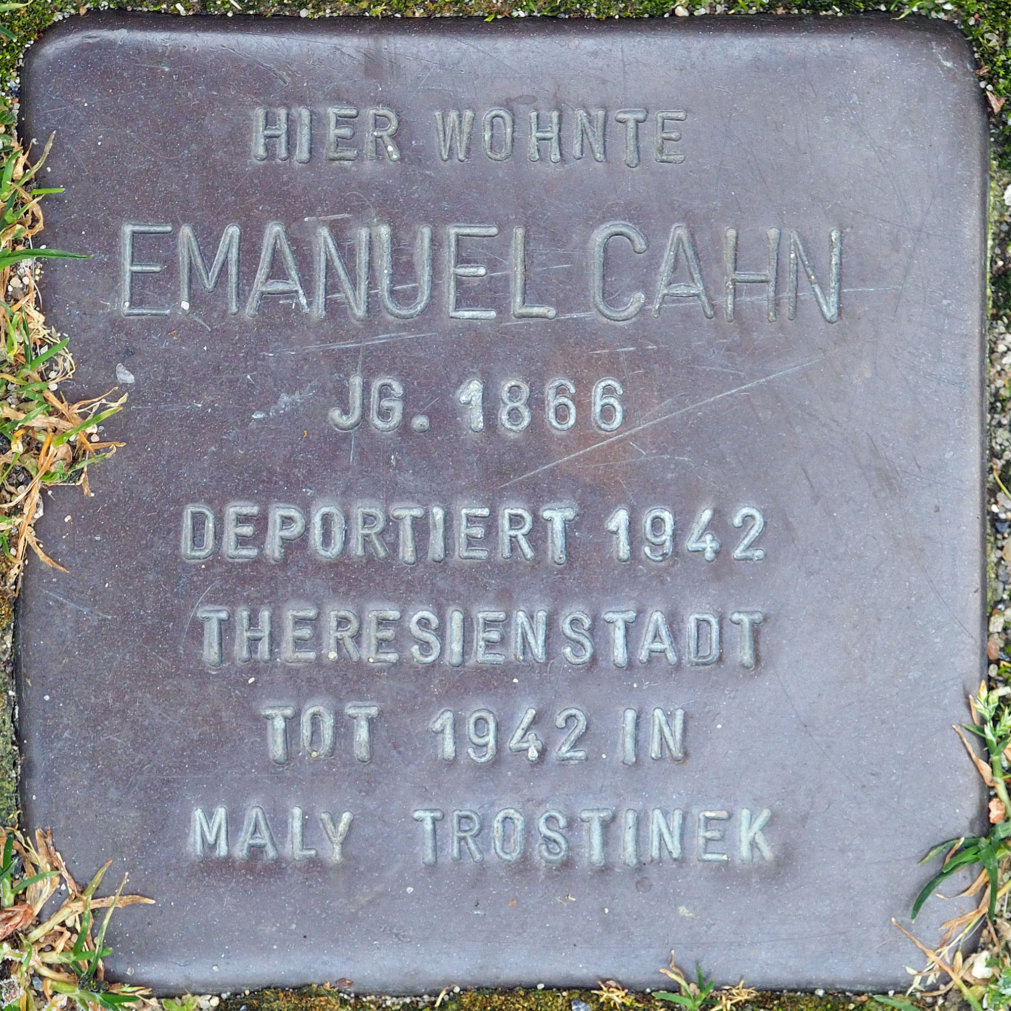 Stolpersteine MG: Cahn, Emanuel